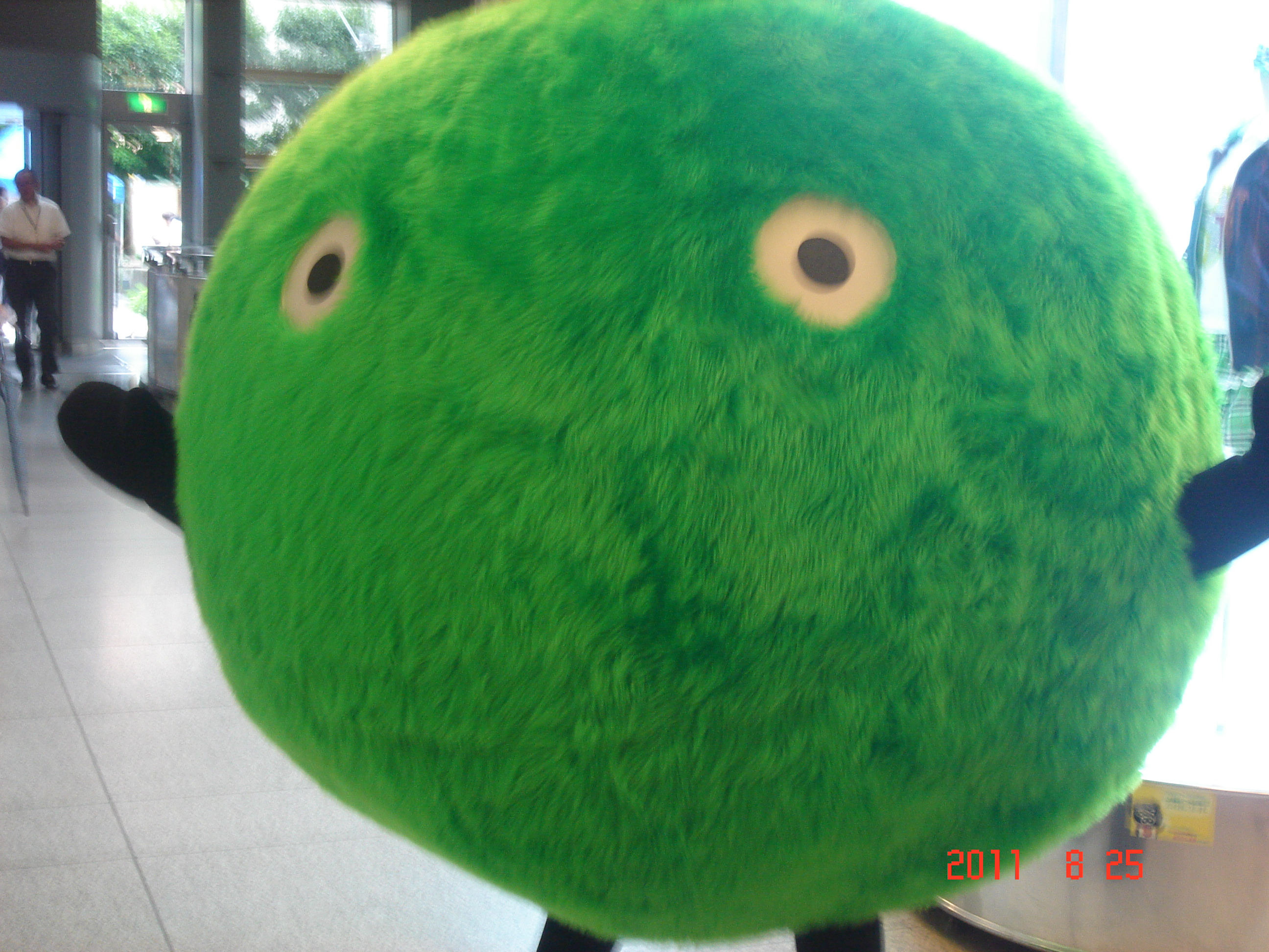 リクルート『SUUMO』のマスコットキャラクター･スーモ。TBS放送センター1Fで撮影。